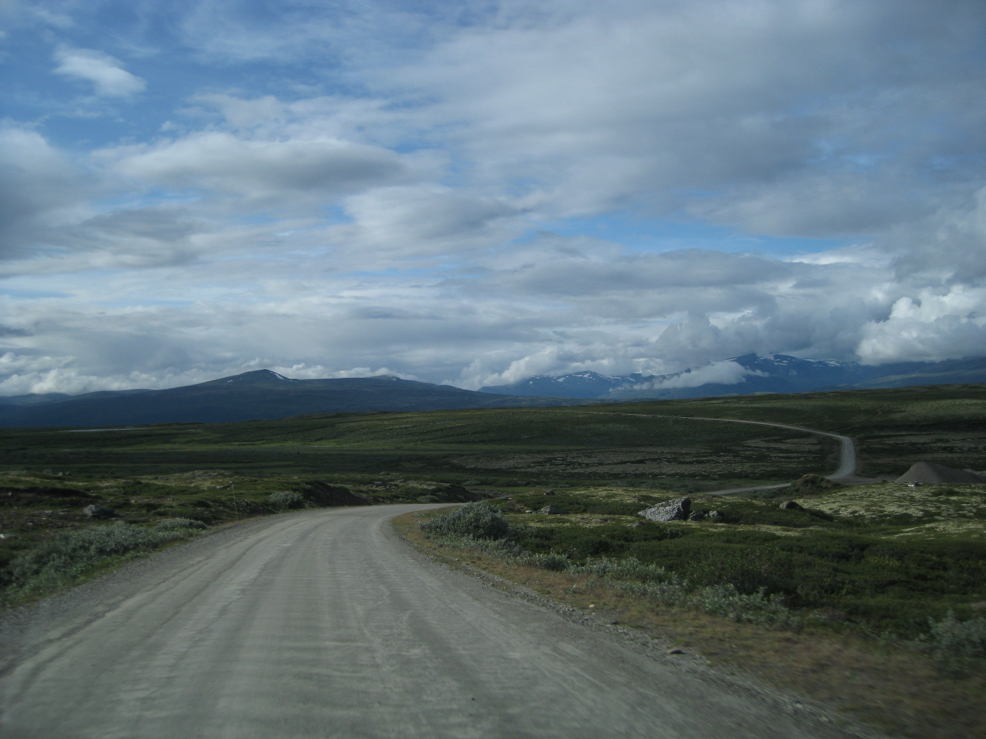 Bilde tatt på vegen mellom Vågåmo og Lesja, sett mot nord.